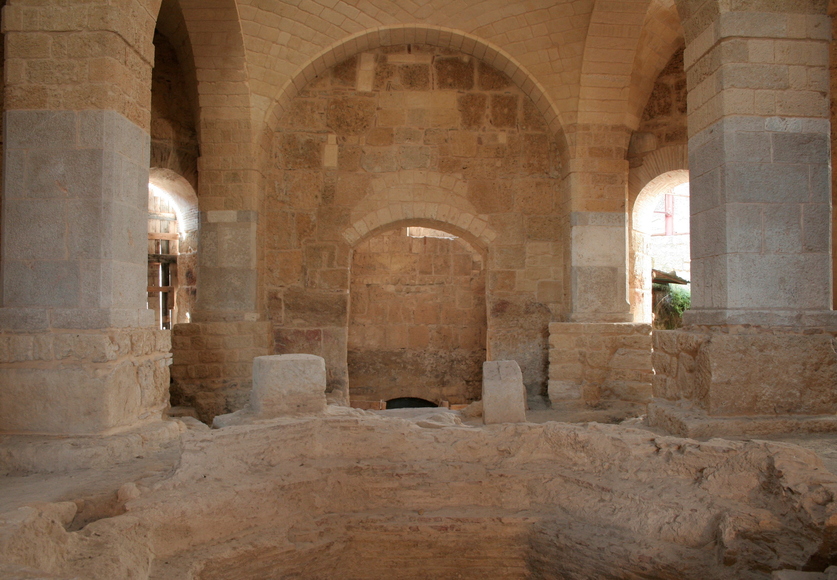 Saint John Baptistery in Canosa di Puglia